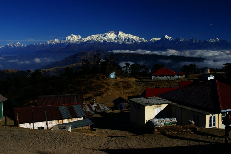 Singalila Range and Kanchenjungha from Sandakphu